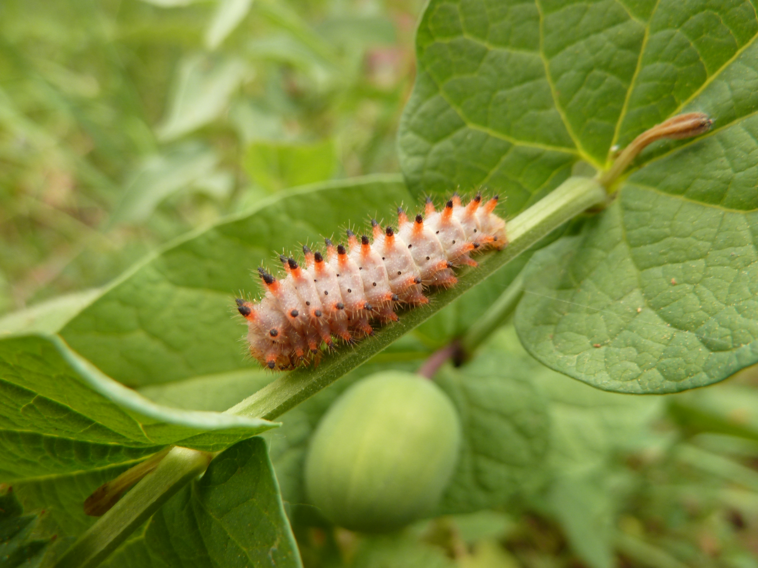 Chenille du papillon DIANE sur Aristoloche dans la Réserve Naturelle de la Plaine des Maures - Suberaie, les 5 Sèdes, Le Cannet-des-Maures